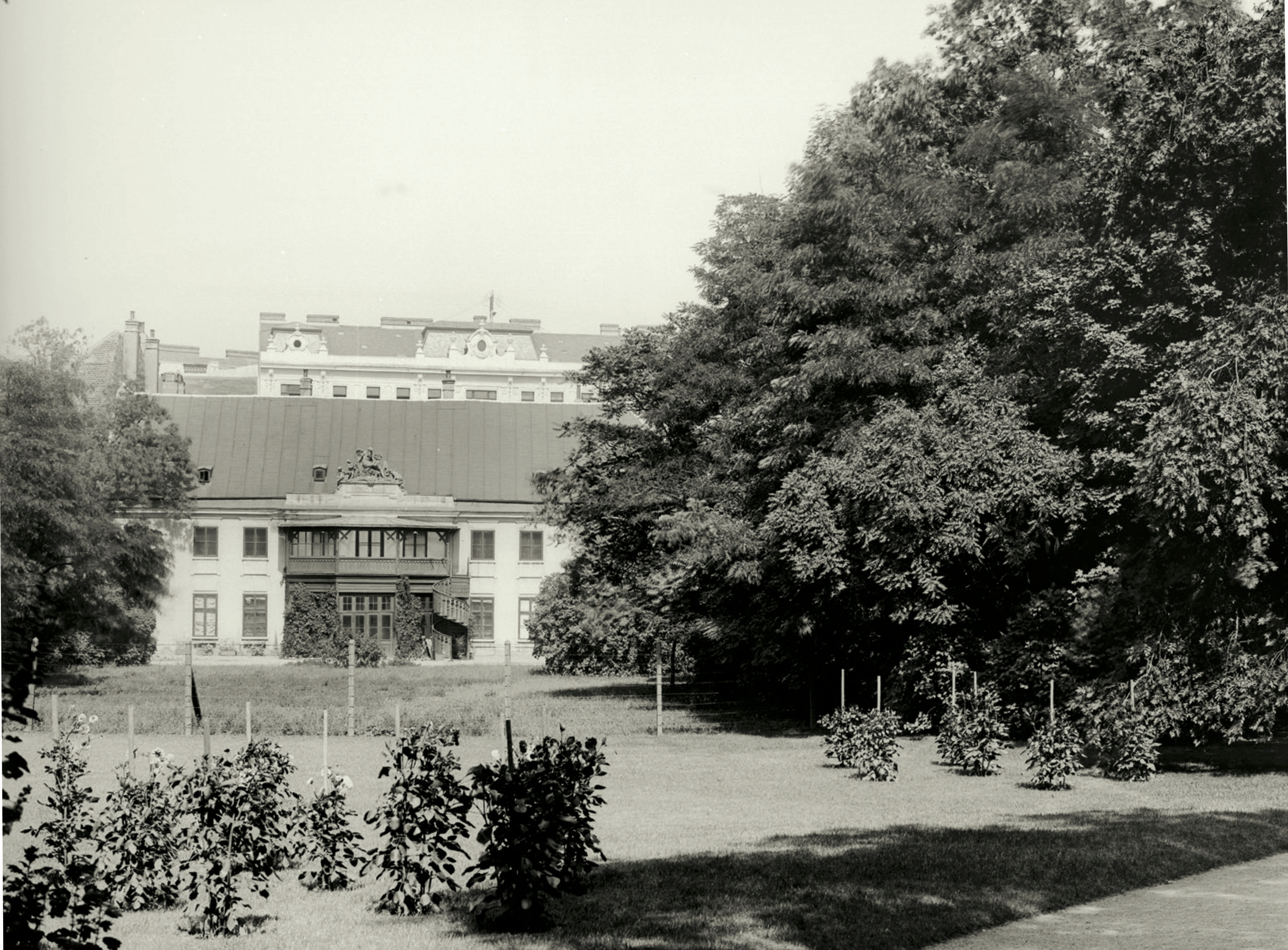 Gartenseite des Palais Arenberg, bis 1810 Palais Esterházy, 1030 Wien.